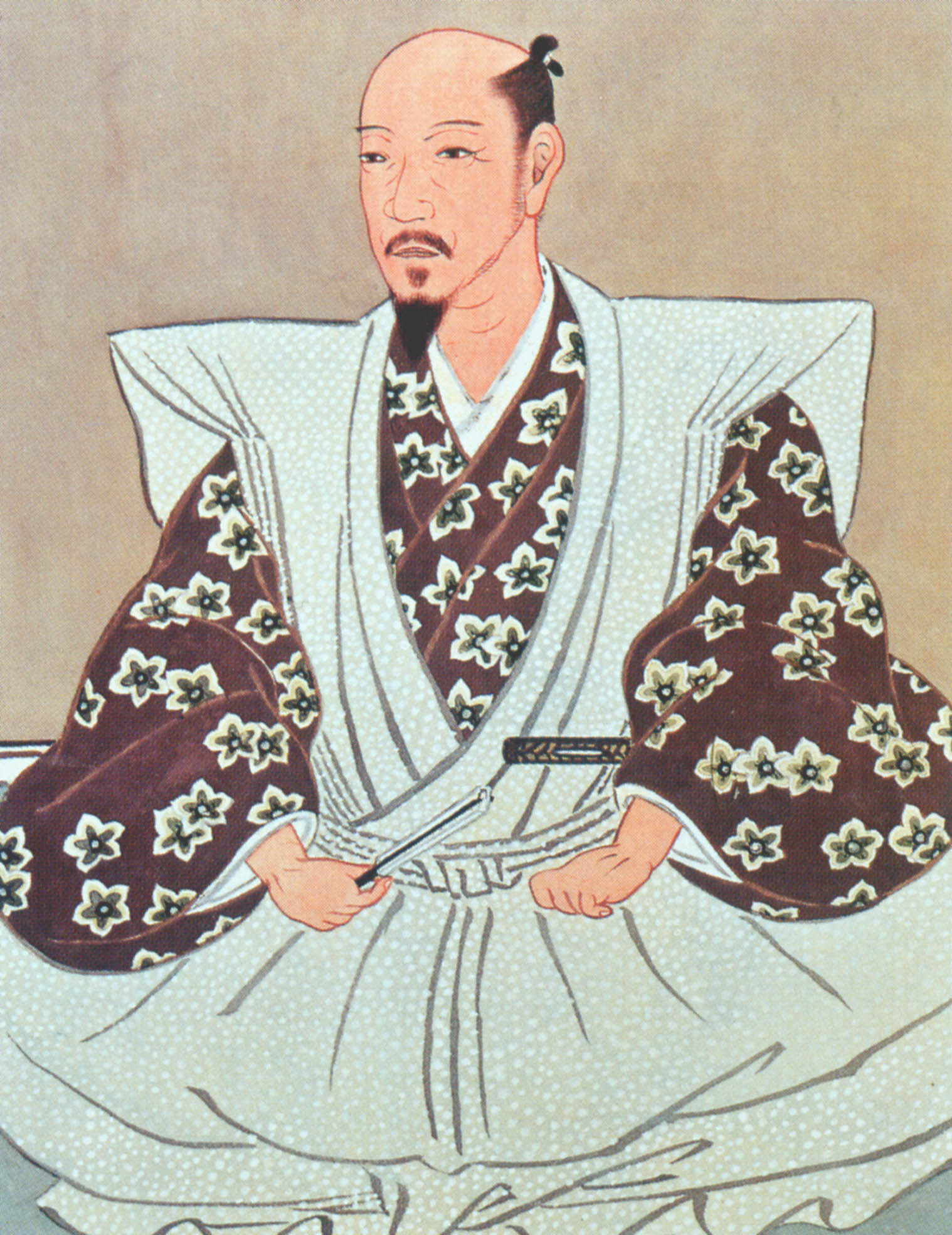 加藤清正 肖像画 Portrait of Katō Kiyomasa.